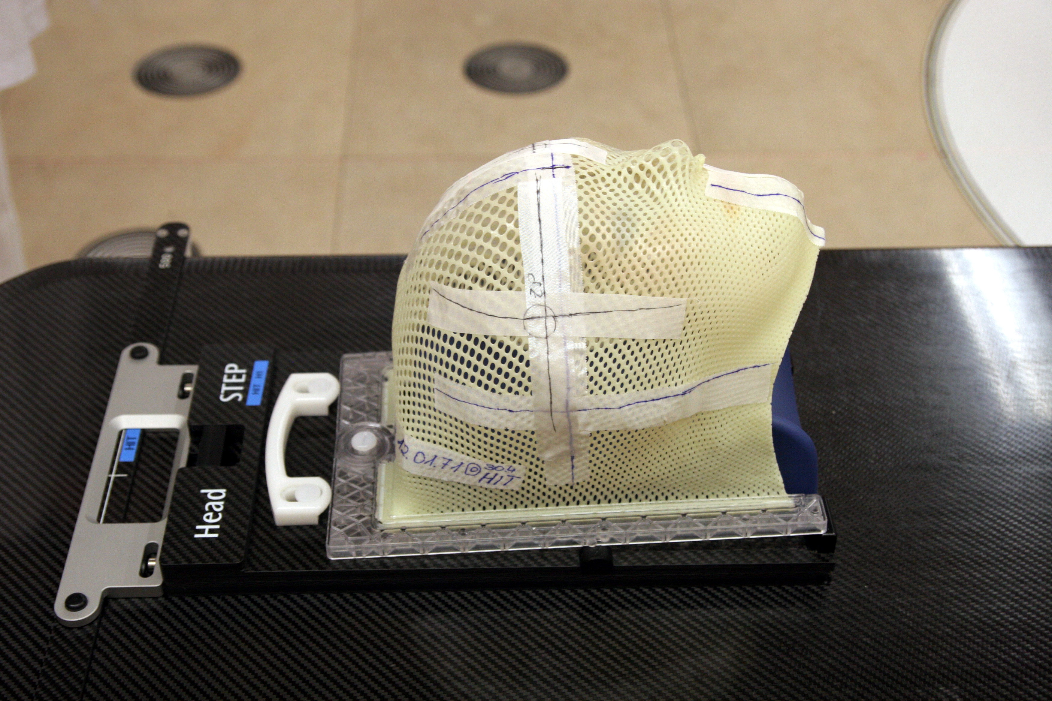 Individuell angefertigte Bestrahlungsmaske zur Bestrahlung eines Hirn- oder Kopftumors, am Heidelberger Ionenstrahl-Therapiezentrum (HIT).